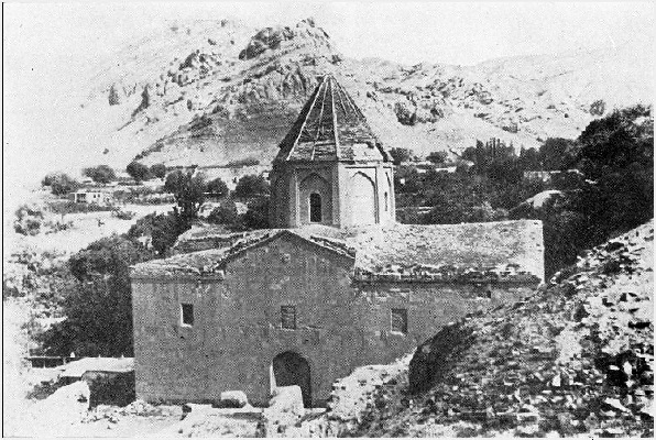 Ագուլիսի սբ.Քրիստափոր եկեղեցի St. Christopher church, Agulis